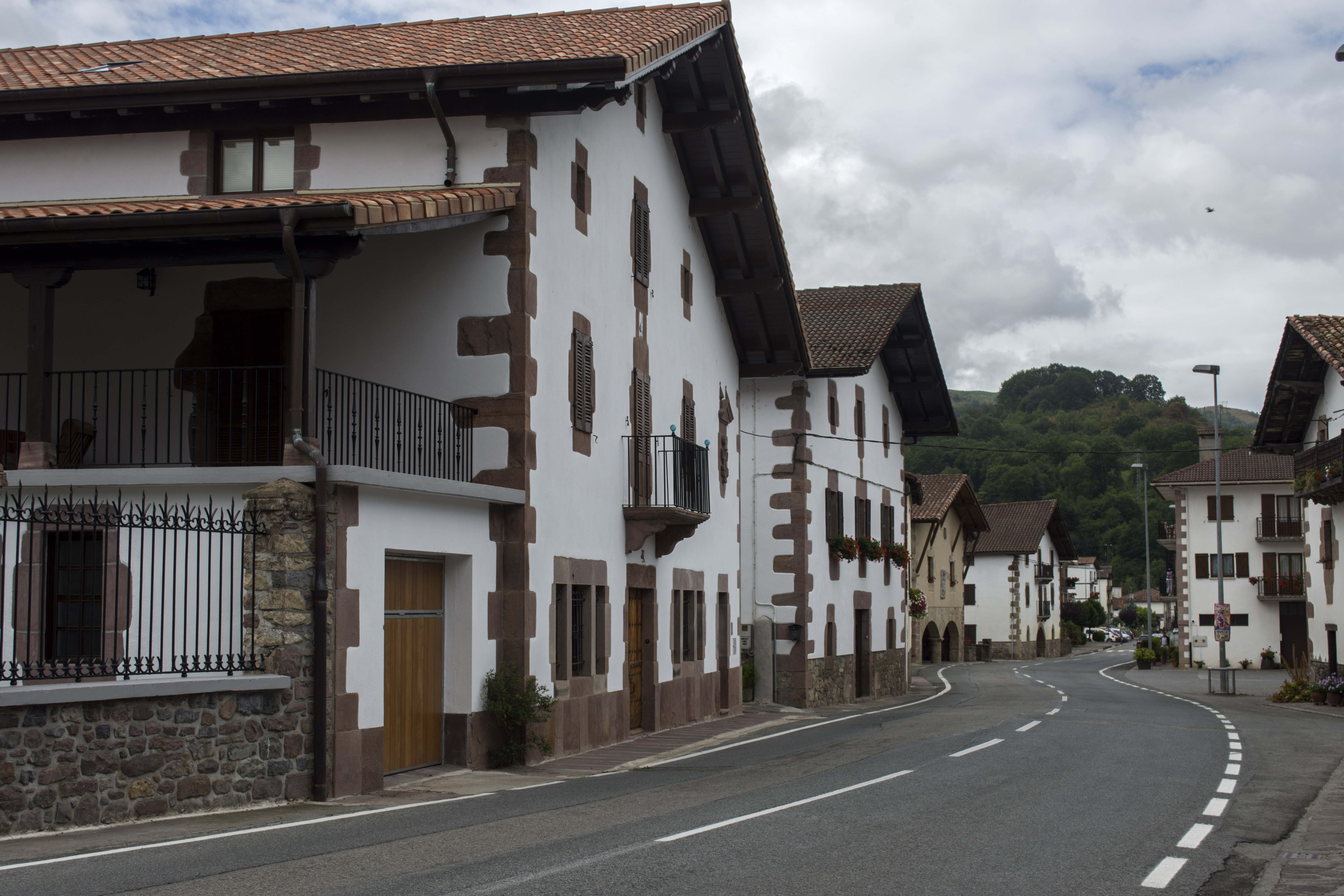 Vista de Oronoz-Mugaire, en Baztán. Navarra (España). Carretera N-121-B